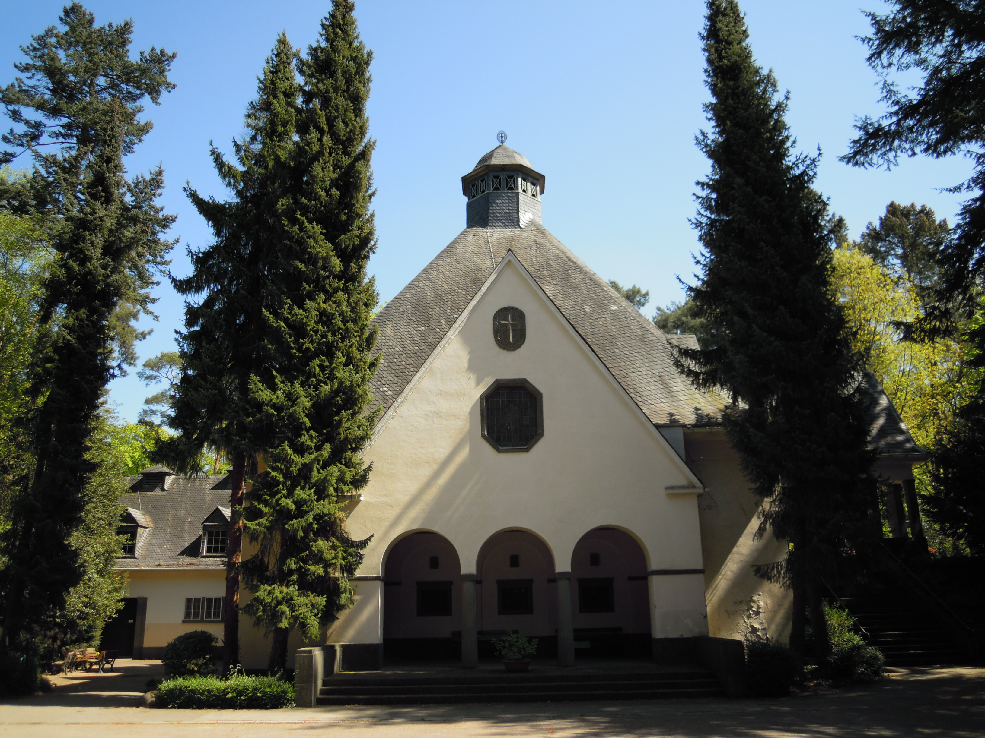 Waldfriedhof in Frankfurt-Oberrad, Burgenlandweg, Trauerhalle